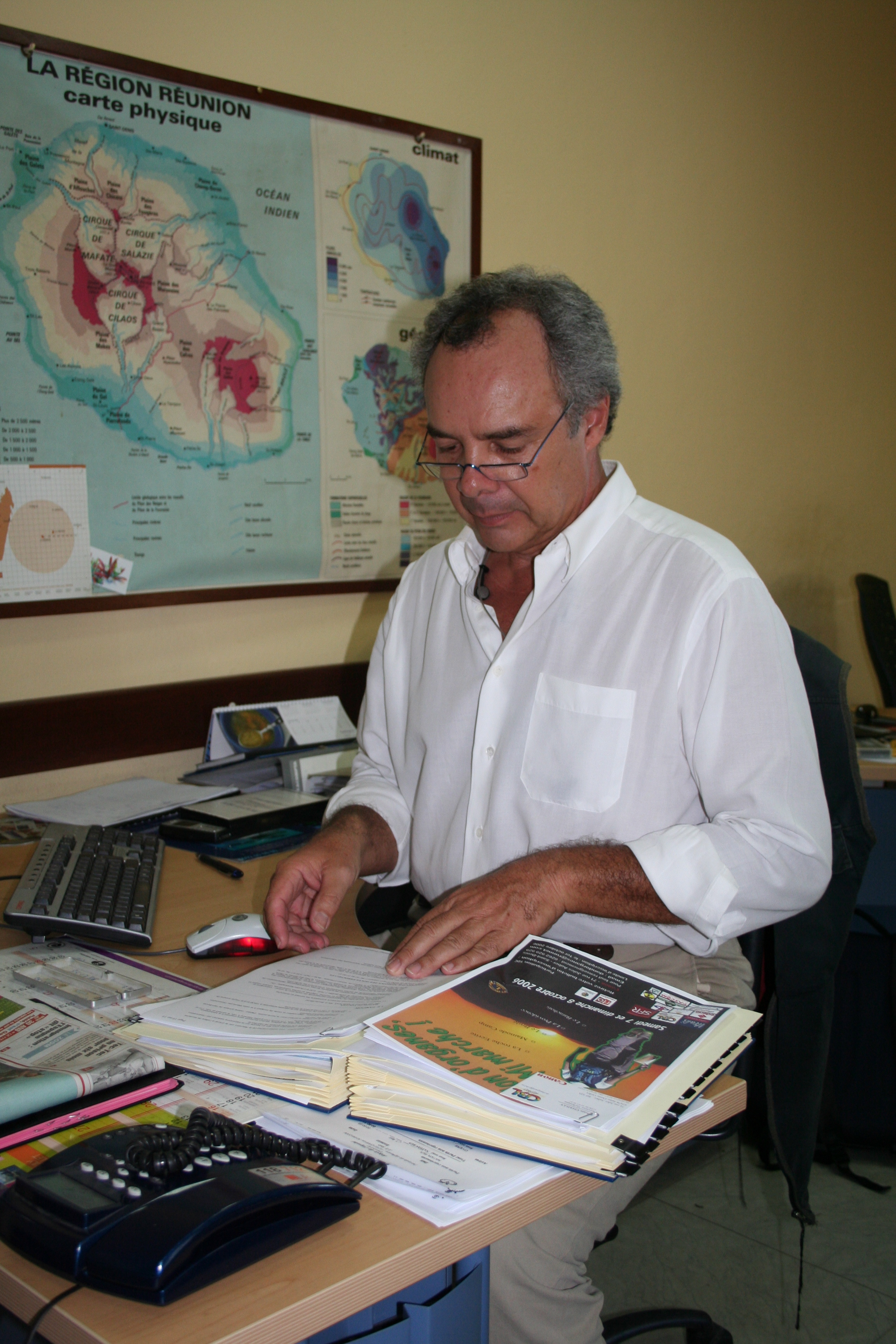 Gilbert Hoair dans la rédaction de Télé Réunion.